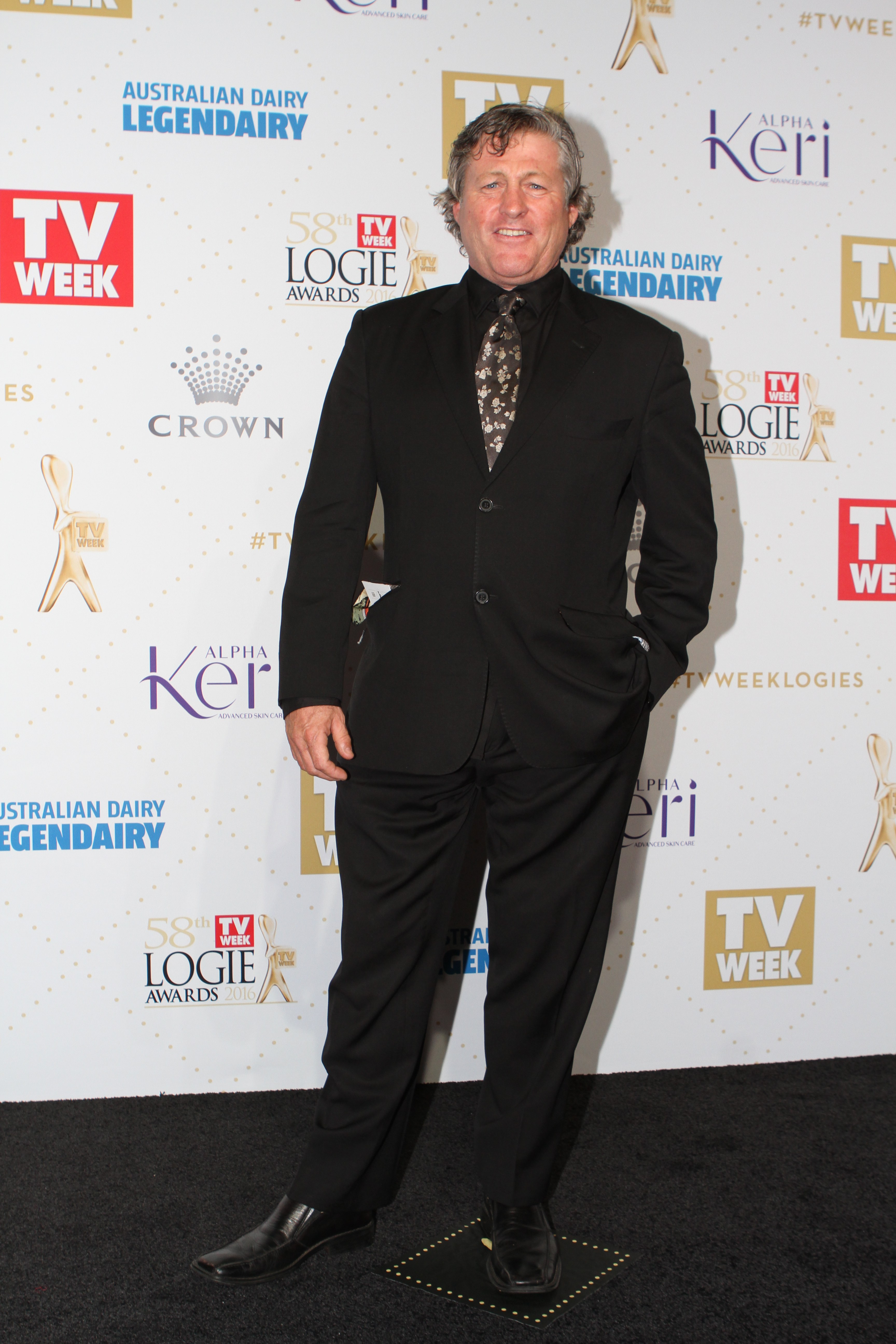 Peter Phelps 2016 TV Week Logies